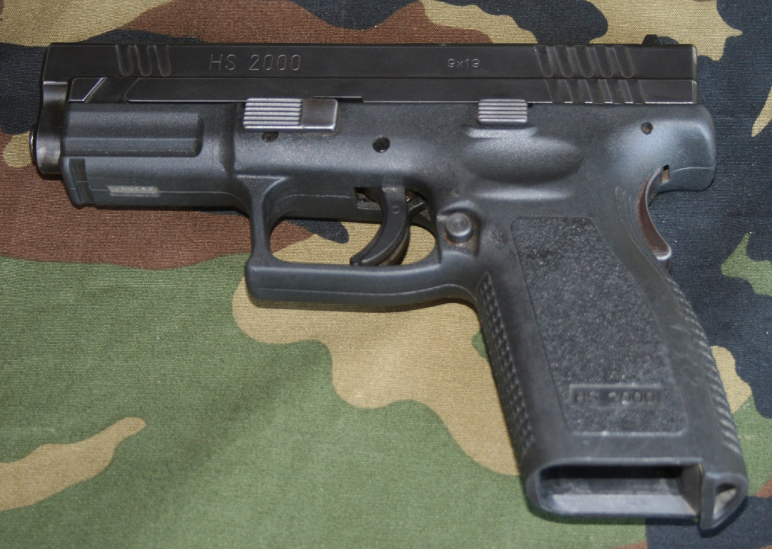 Osamnaesta obljetnica Oružanih snaga RH i Hrvatske kopnene vojske. Središnja proslava održana je u Karlovcu.